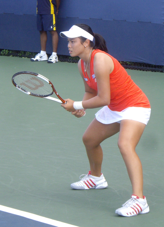 Yung Jan Chan at 2007 US Open